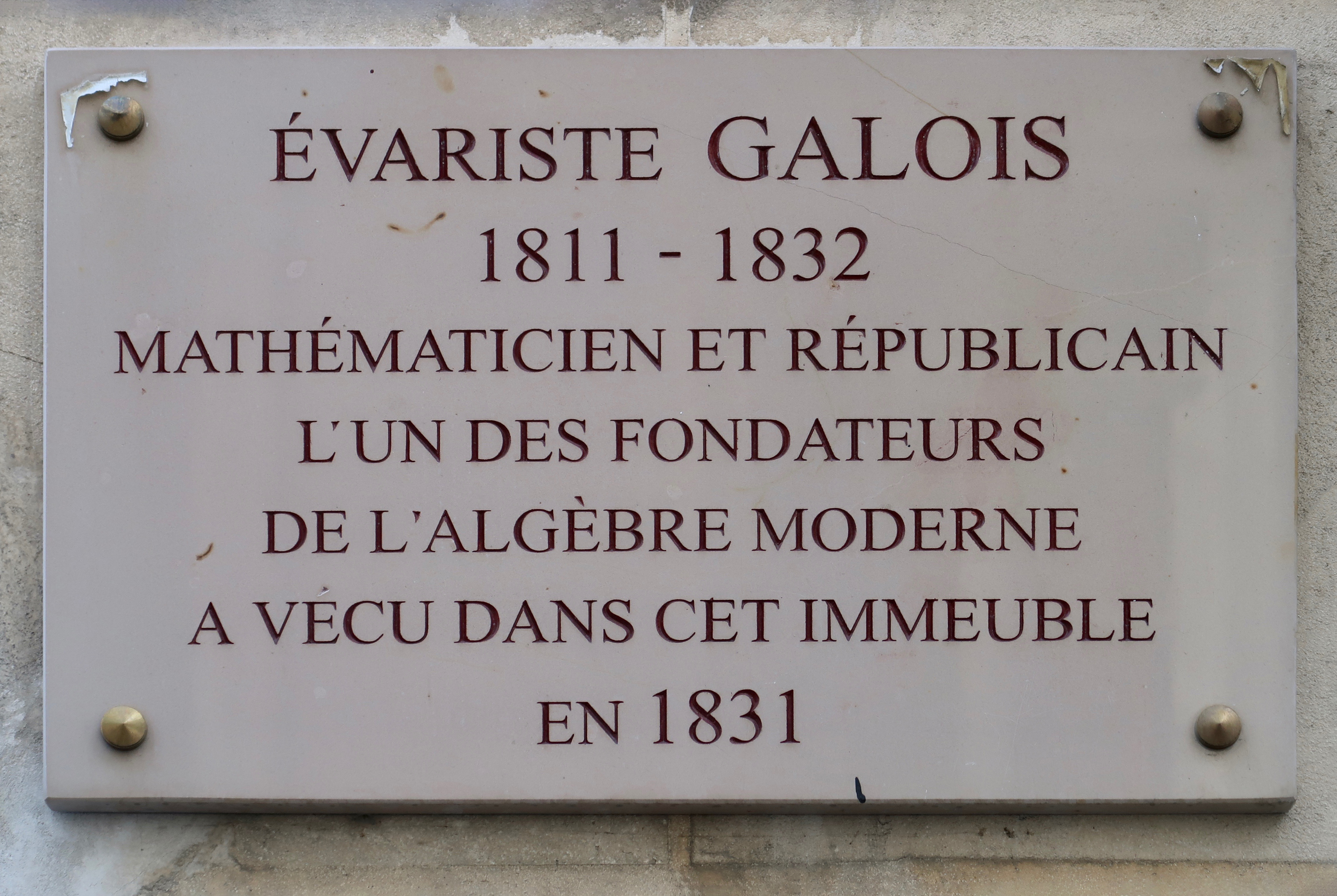 Plaque Évariste Galois, 16 rue des Bernardins (Paris, 5e).